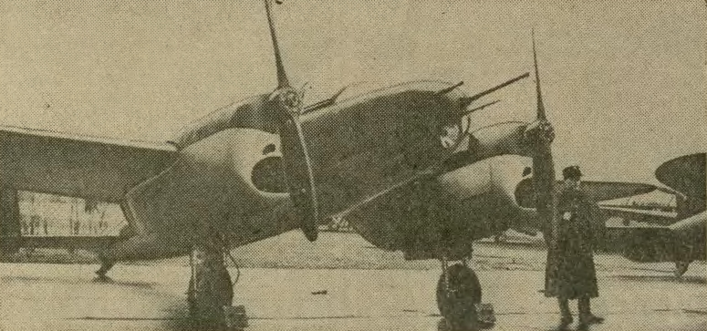 Samolot PZL.38 Wilk